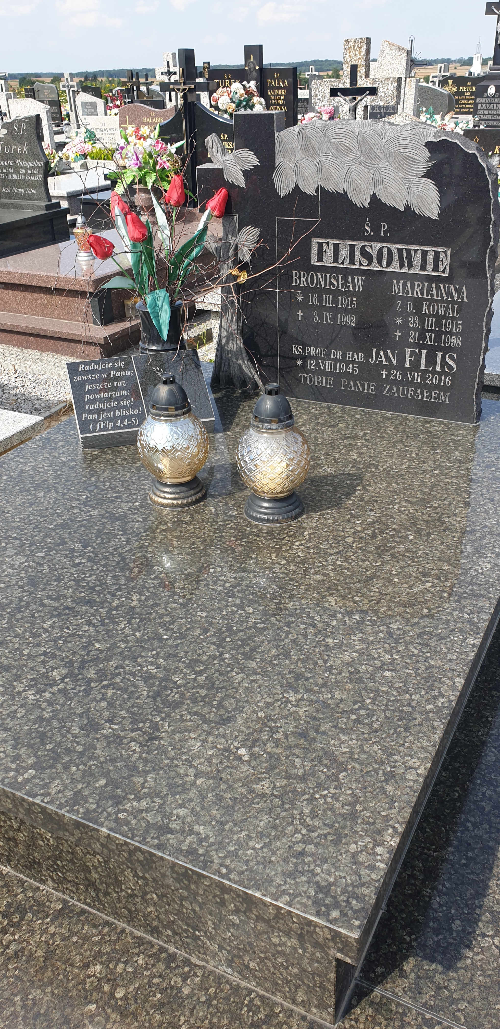 ks. Jan Flis grobowiec rodzinny